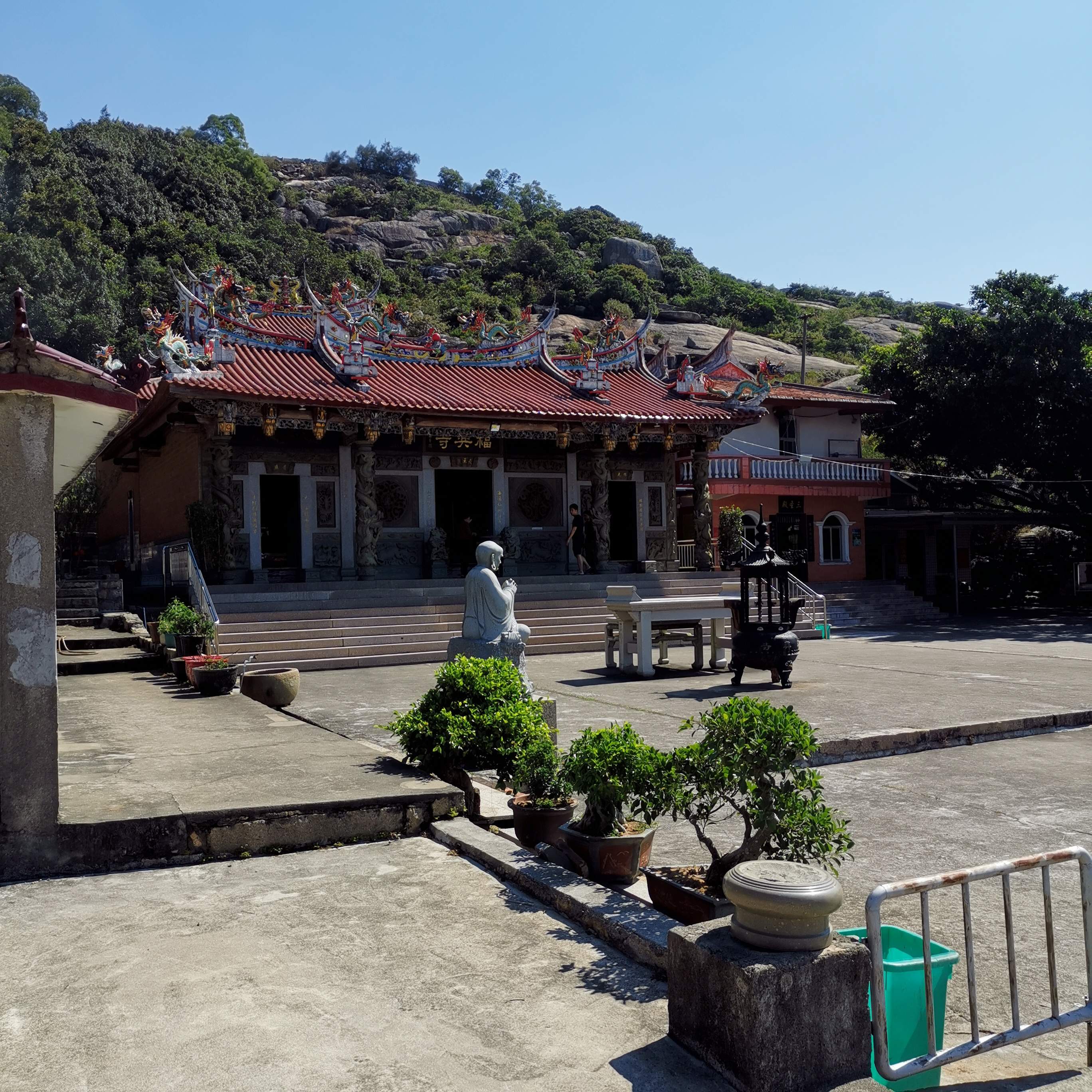 中文（中国大陆）: 福兴寺，位于福建省漳州市龙海市隆教乡南太武山。